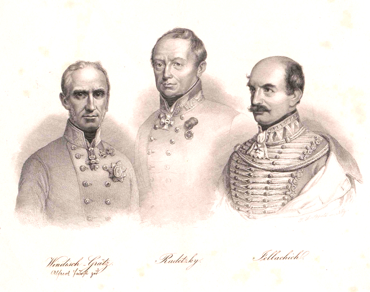 Jellacic de Buzim, Josef Graf (1801 - 1859) Radetzky von Radetz, Josef Graf (1766 - 1858) Windisch-Grätz, Alfred I. Fürst zu (1787 - 1862)